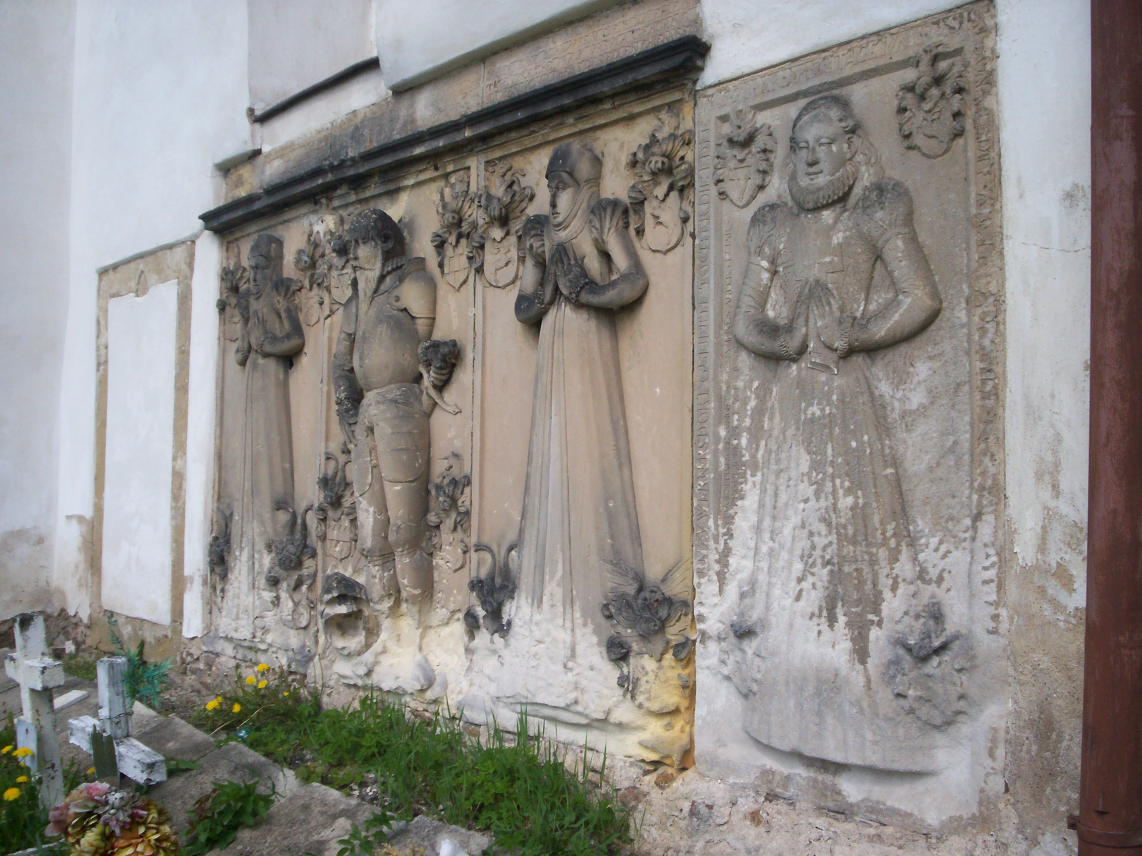 Kościół pw. „Świętej Katarzyny.” w Marciszowie. Epitafia.